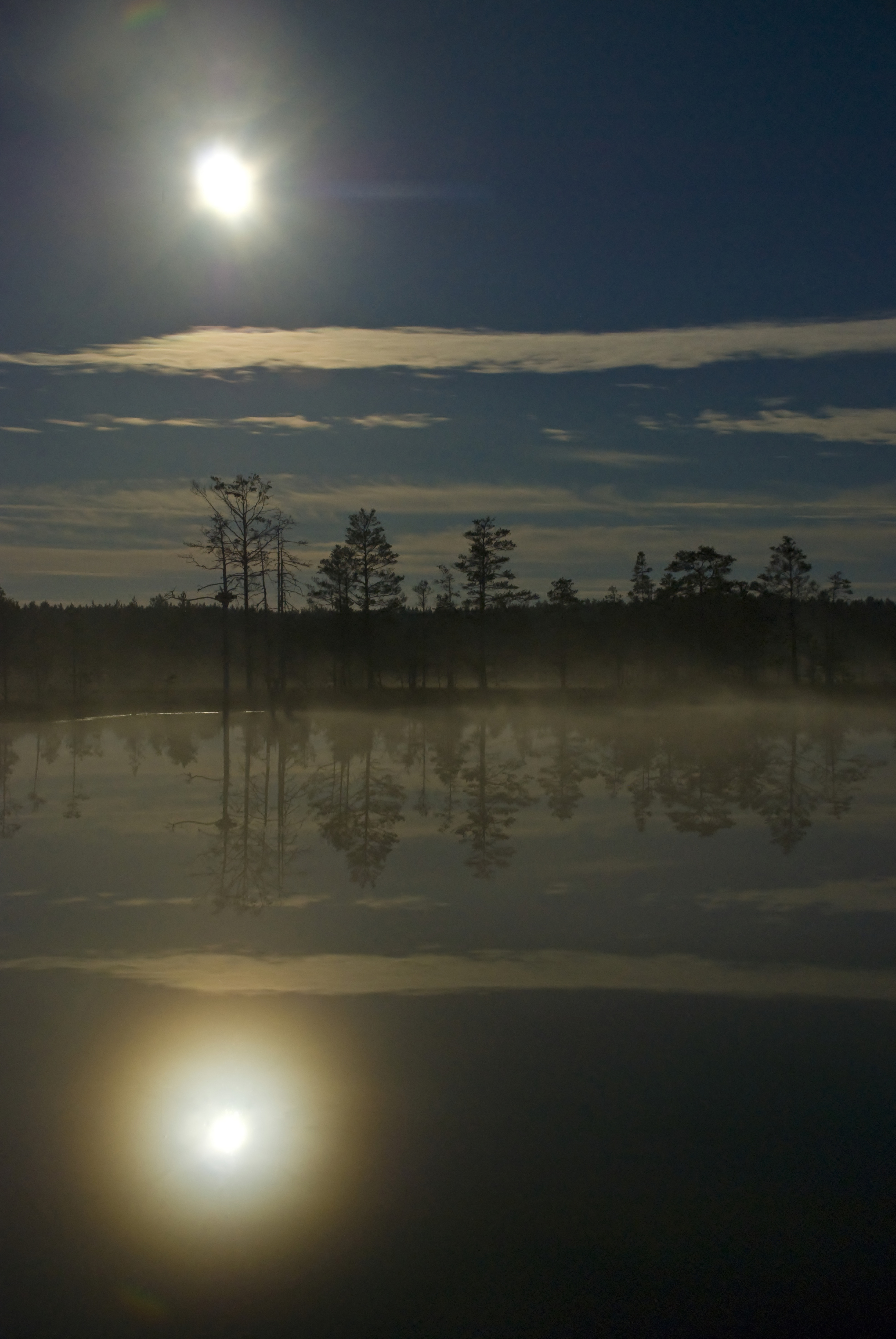 Full moon at Viru bog